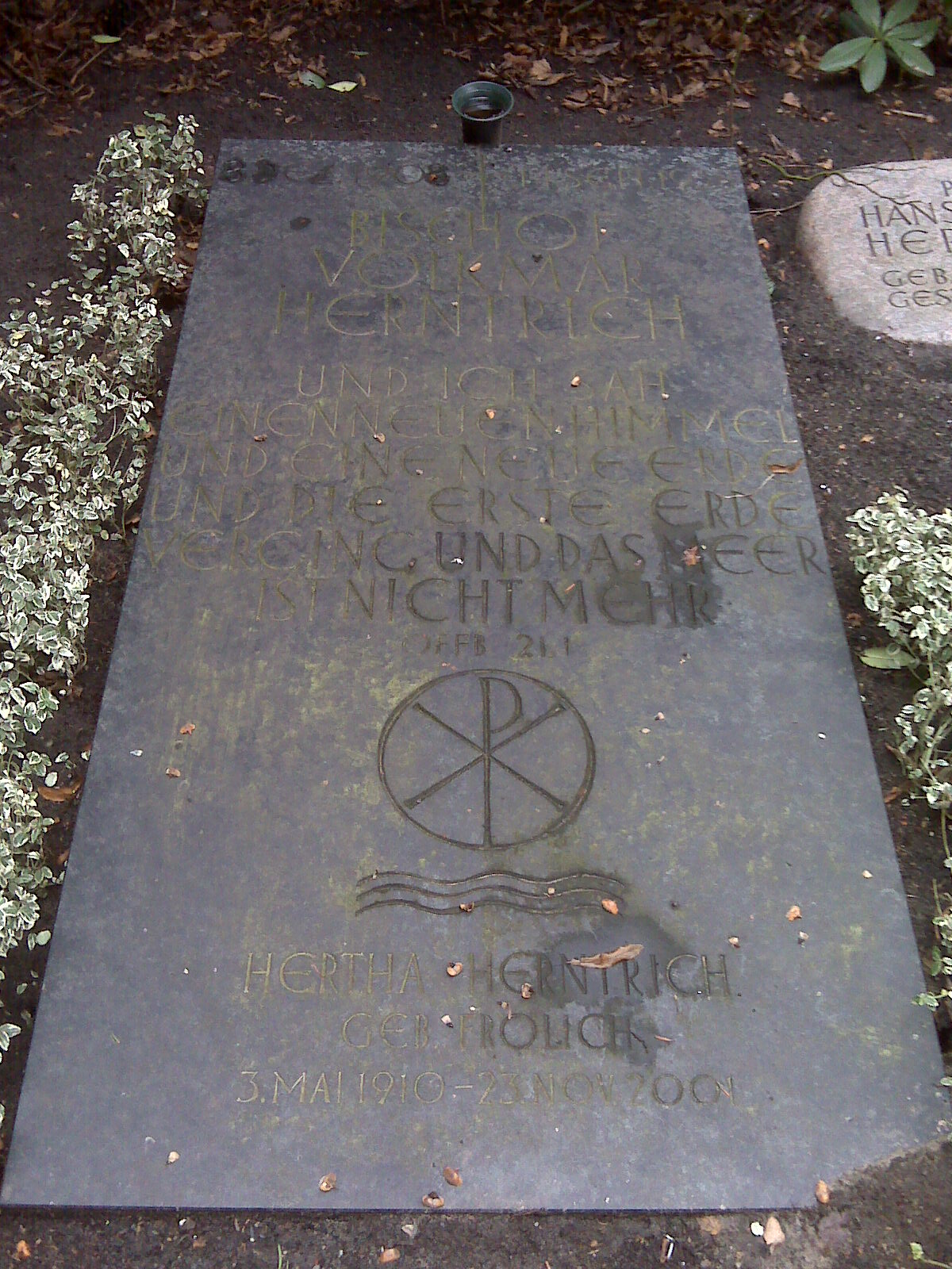 Grabplatte des Hamburger Bischofs